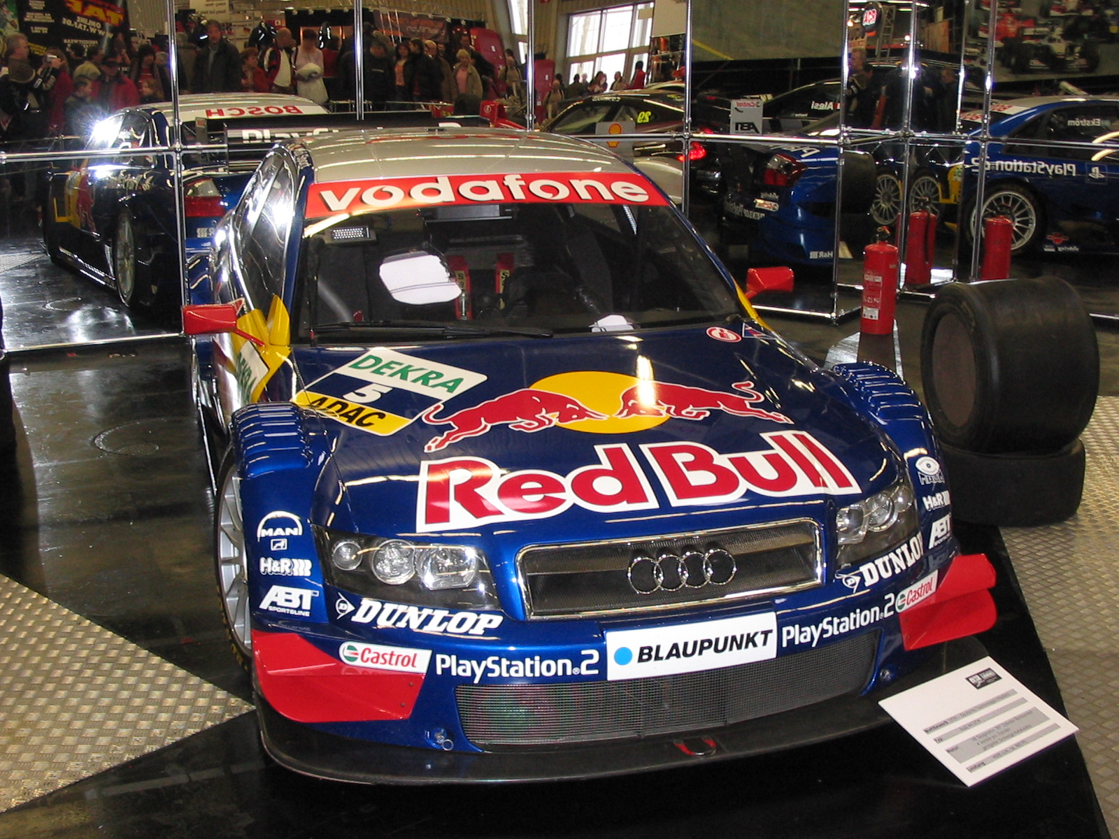 Audi A4 DTM auf dem Nürnberger Autosalon 2006